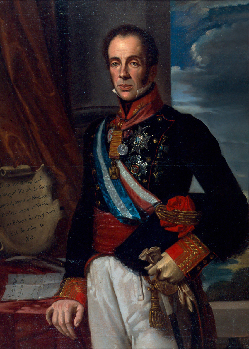 Retrato del General Miguel Ricardo de Álava y Esquivel, Museo de las Bellas Artes de Álava.